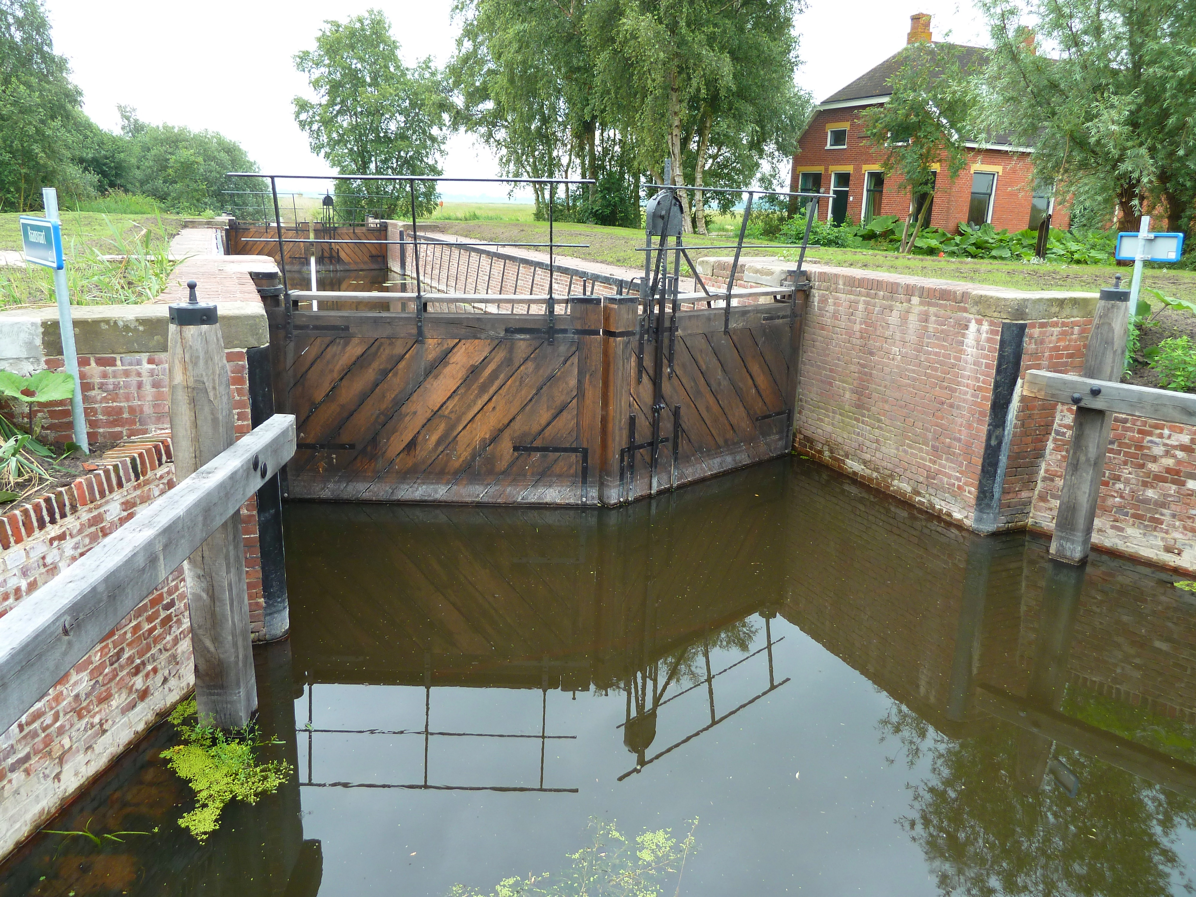 Haanssluis ten zuiden van het Schildmeer. Rechts de sluiswoning.